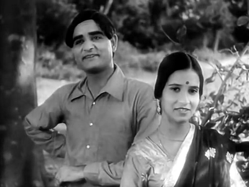 Jamuna et K.L. Saigal dans Devdas (version hindi) (1935)